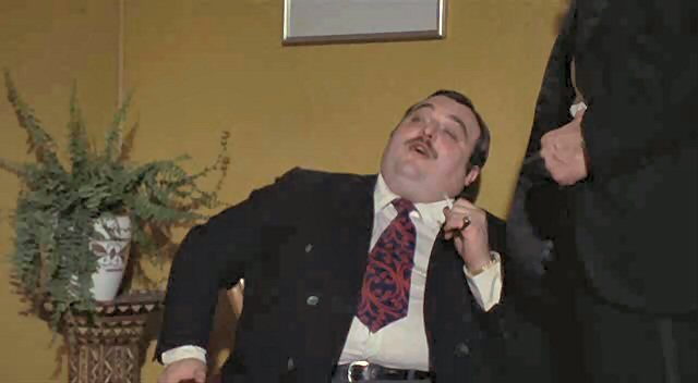 Screenshot dal film La poliziotta della squadra del buoncostume